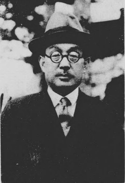 木島 茂